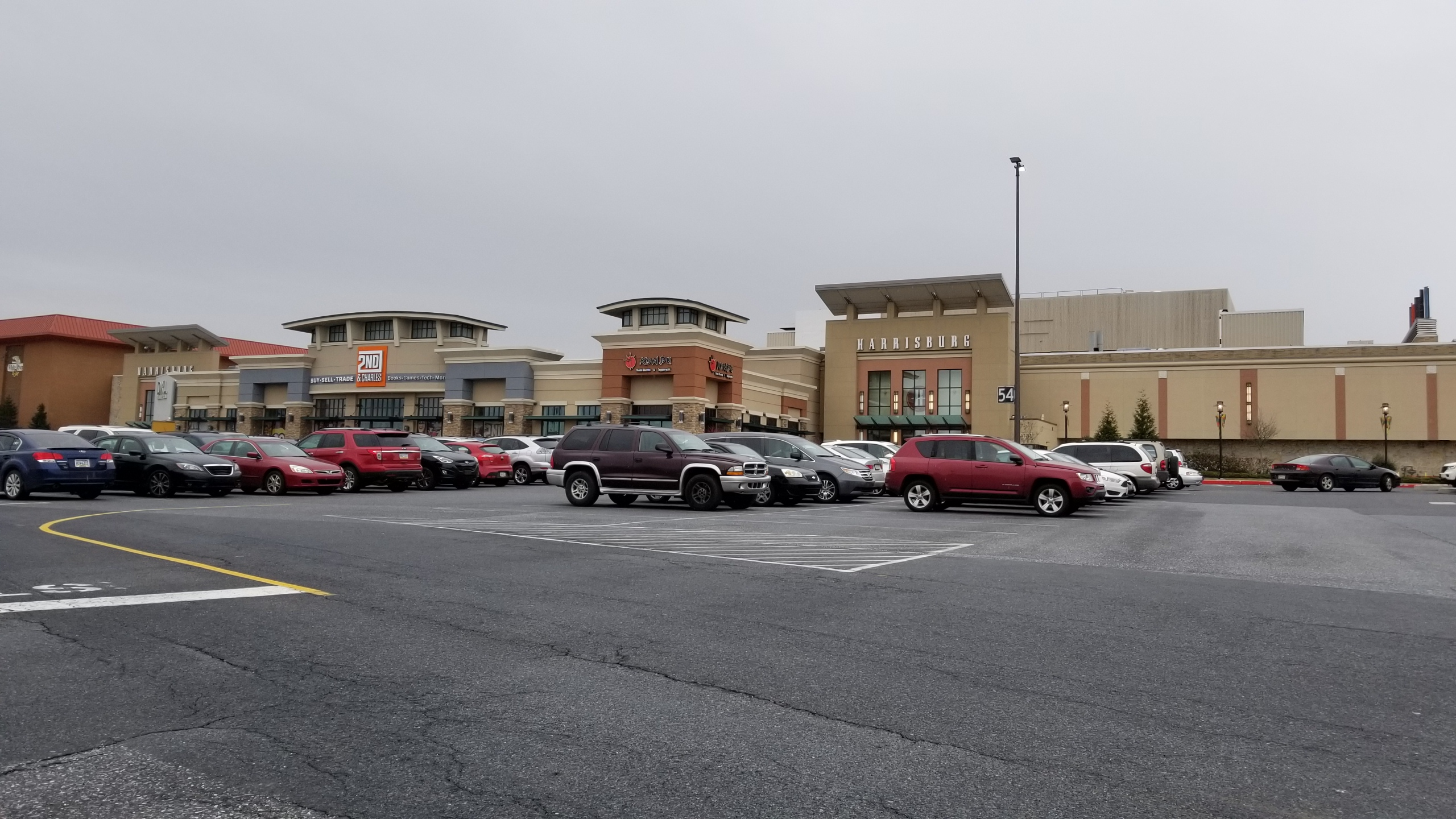 Harrisburg Mall Harrisburg, PA March 2018